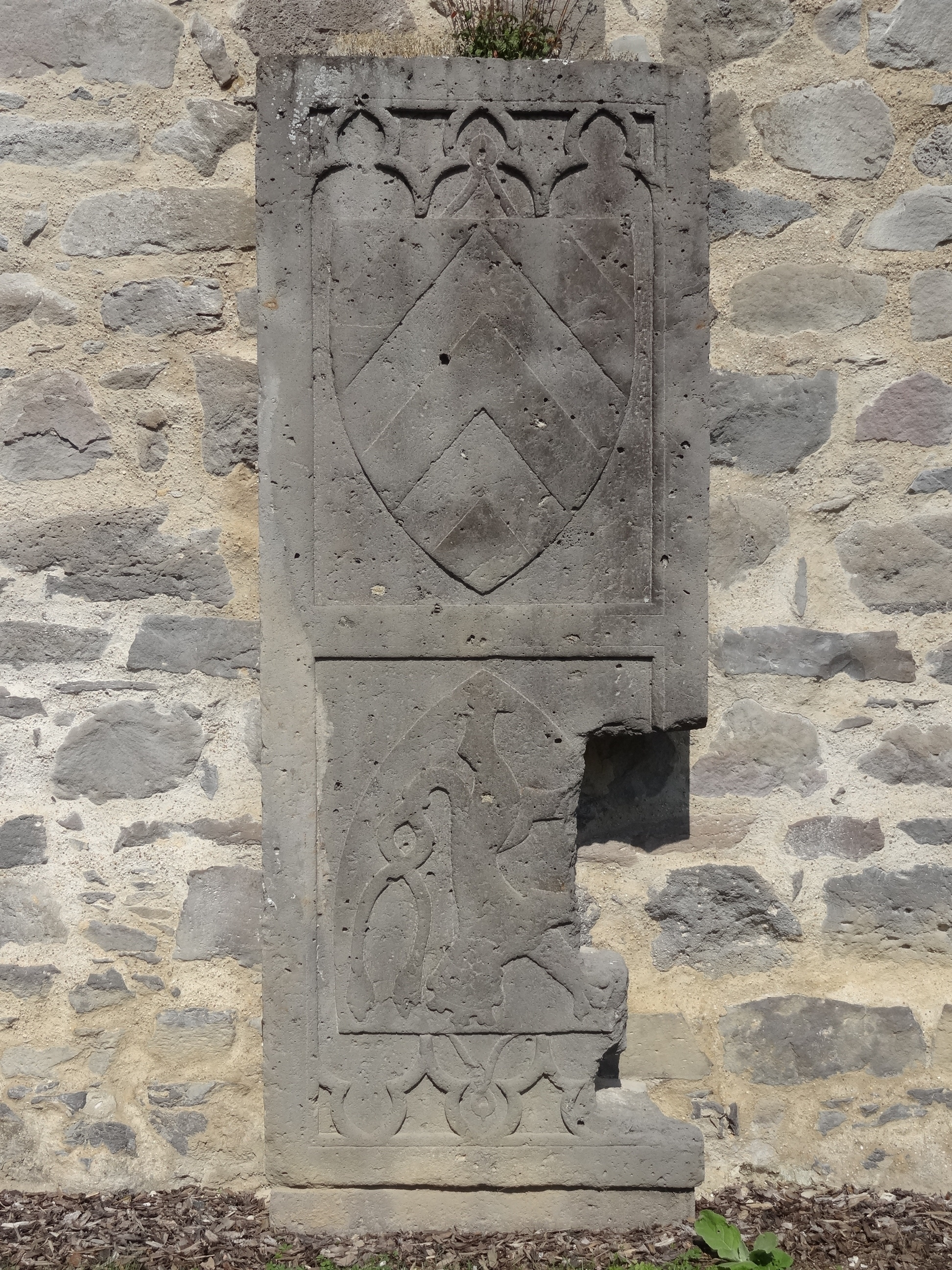 Kloster Arnsburg (Kreuzgang und Kriegsopferfriedhof)